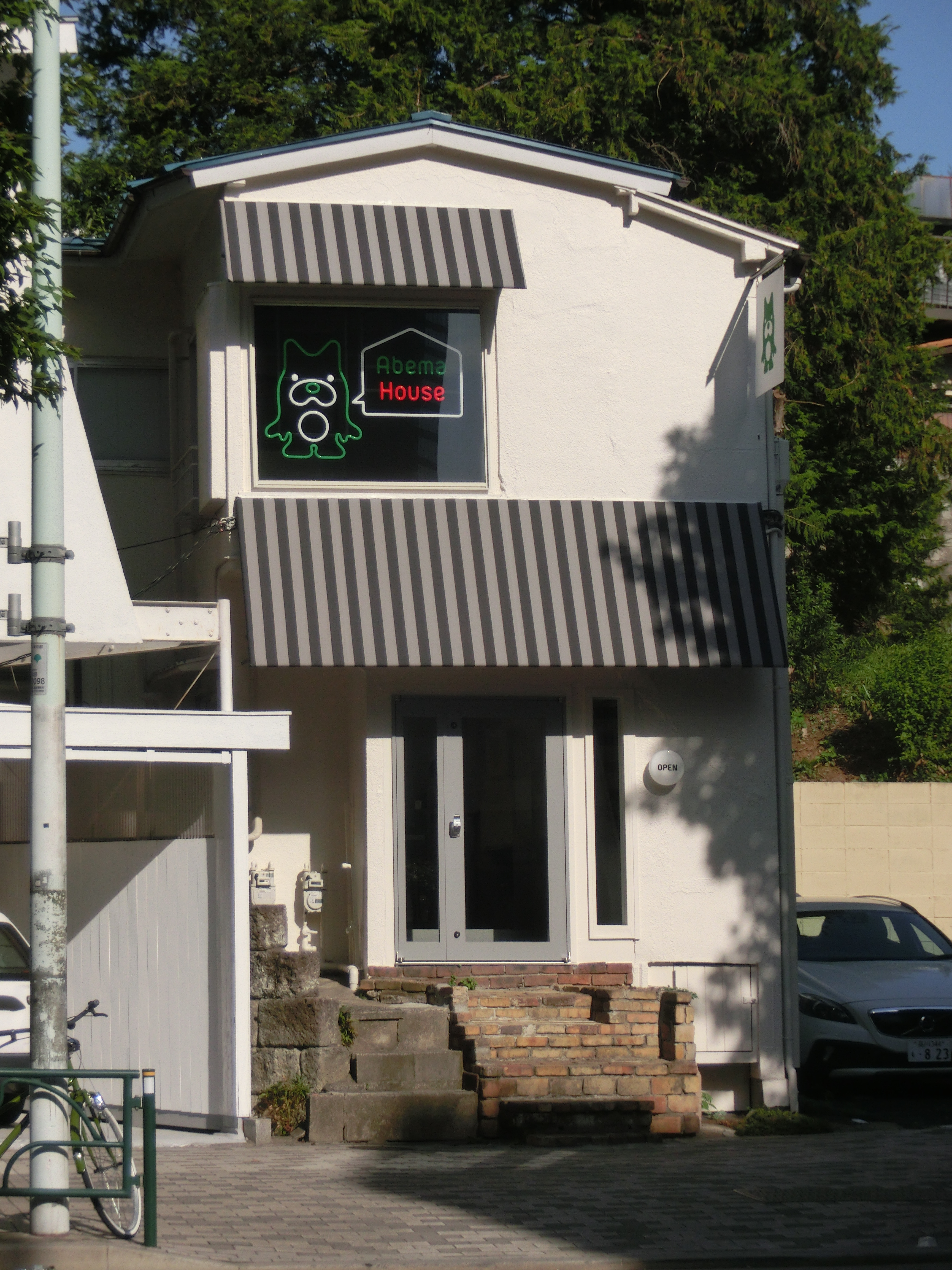 原宿アベマハウス